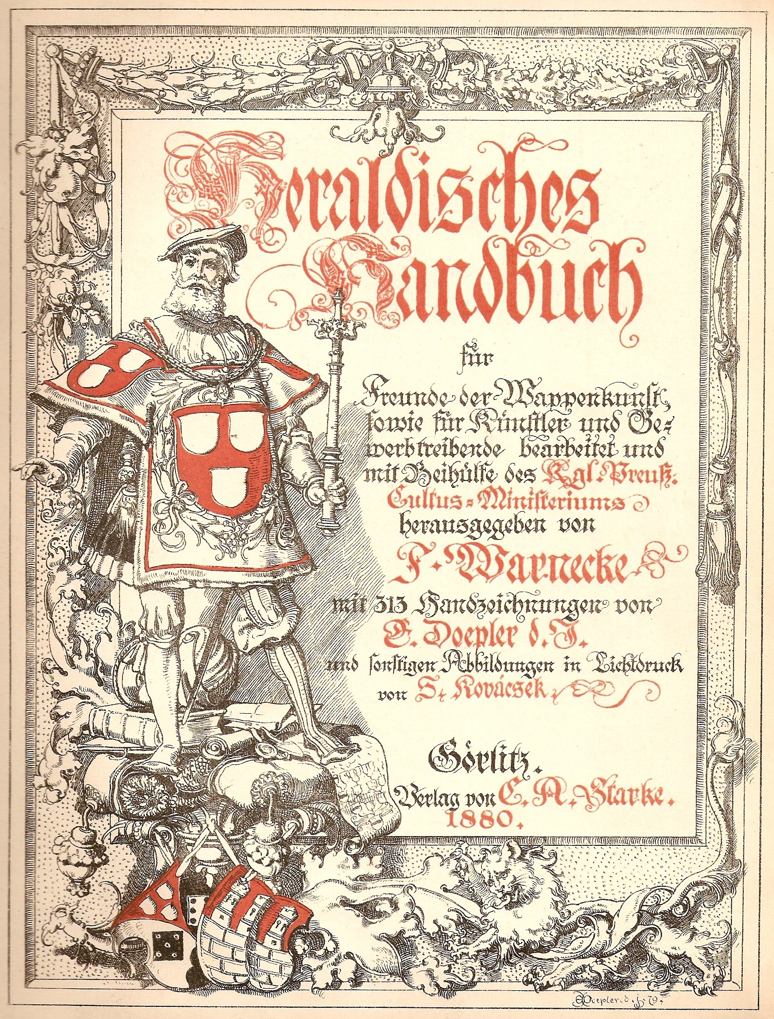 Titelblatt aus „Heraldisches Handbuch“, C. A. Starke Verlag, Görlitz 1880